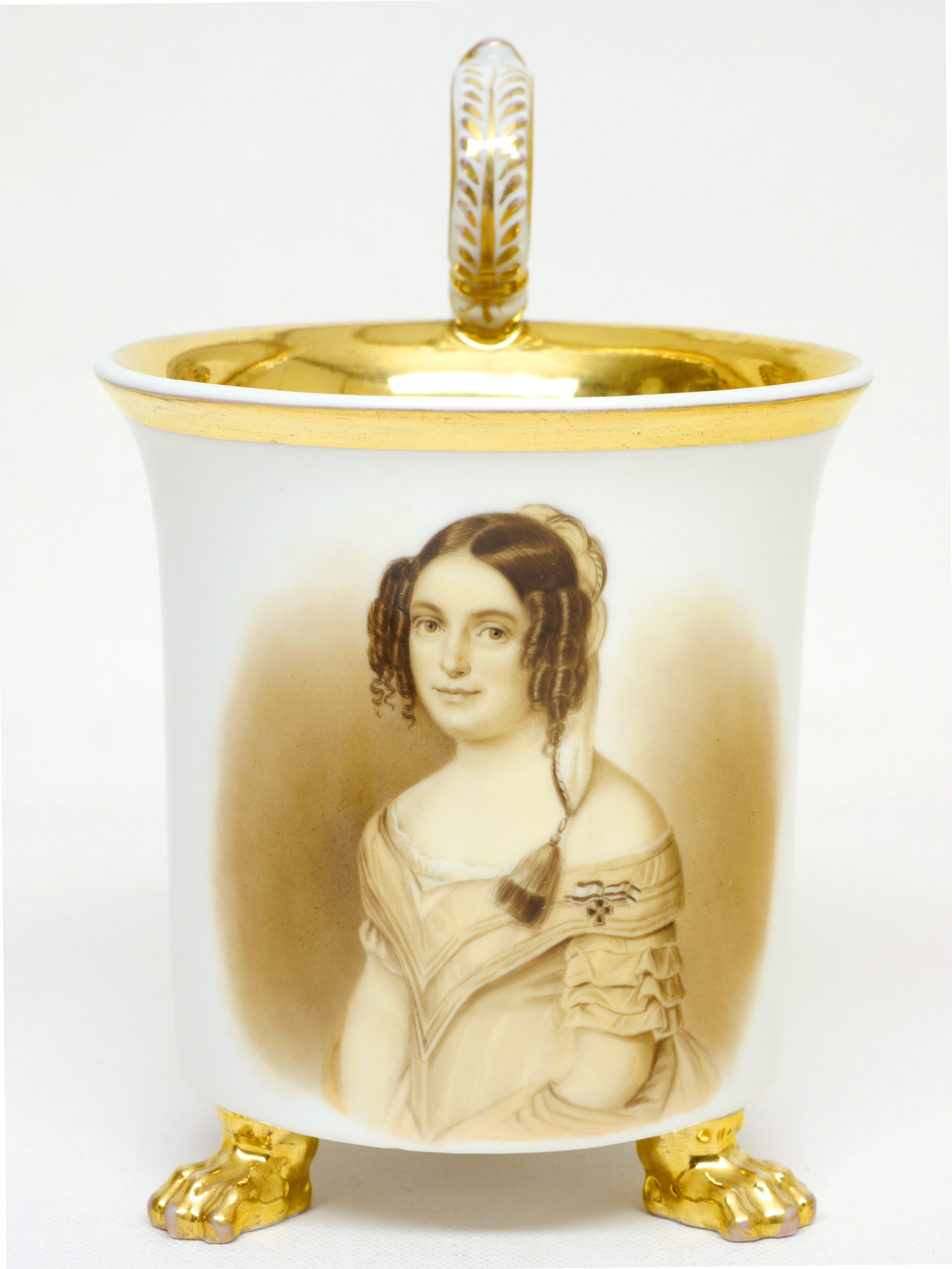 Marie Friederike of Hessen-Kassel (1768-1839) KPM Berlin, 1837-1844